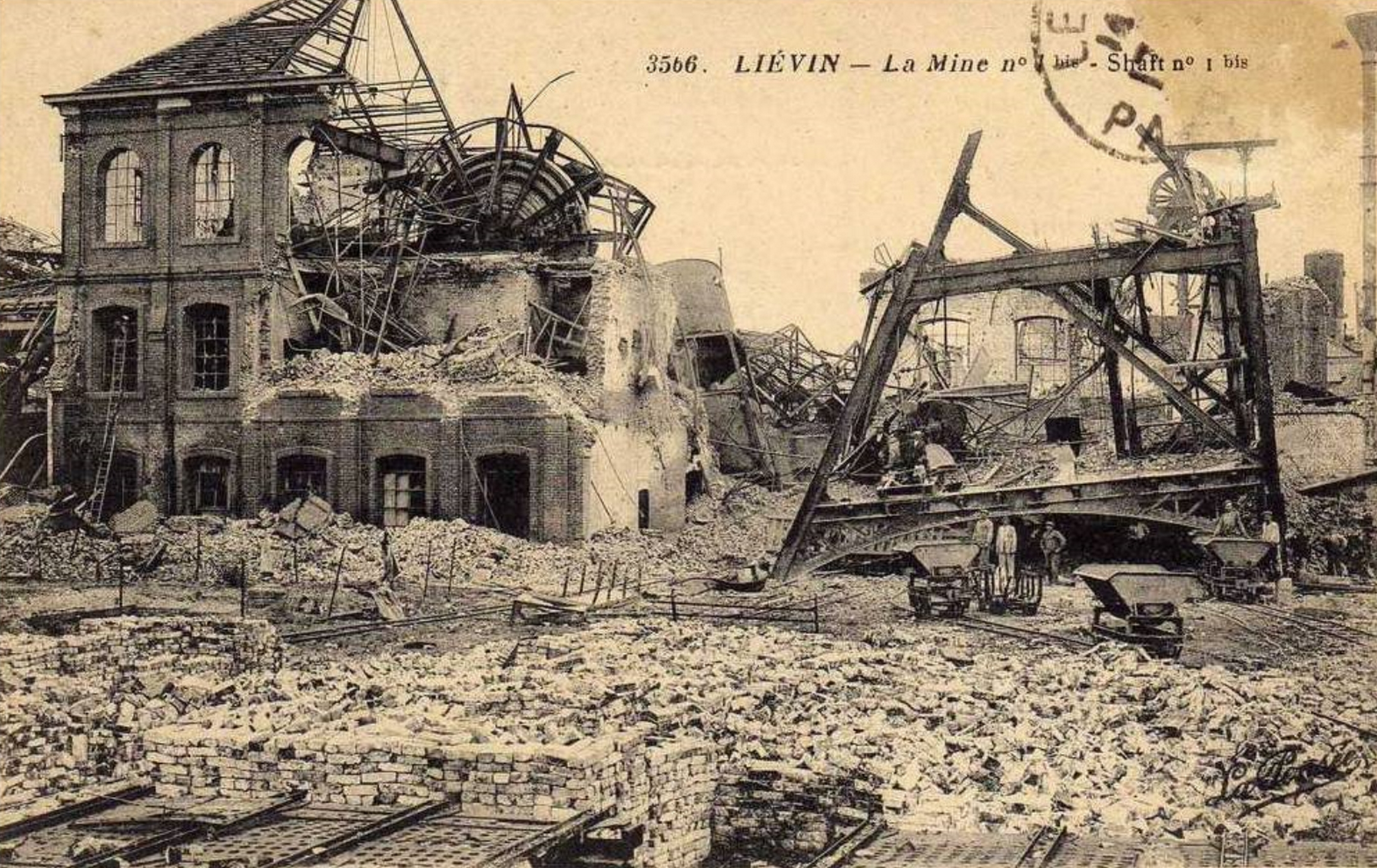 La Fosse n° 1 - 1 bis - 1 ter de la Compagnie des mines de Liévin était un charbonnage constitué de trois puits situé à Liévin, Pas-de-Calais, Nord-Pas-de-Calais, France.